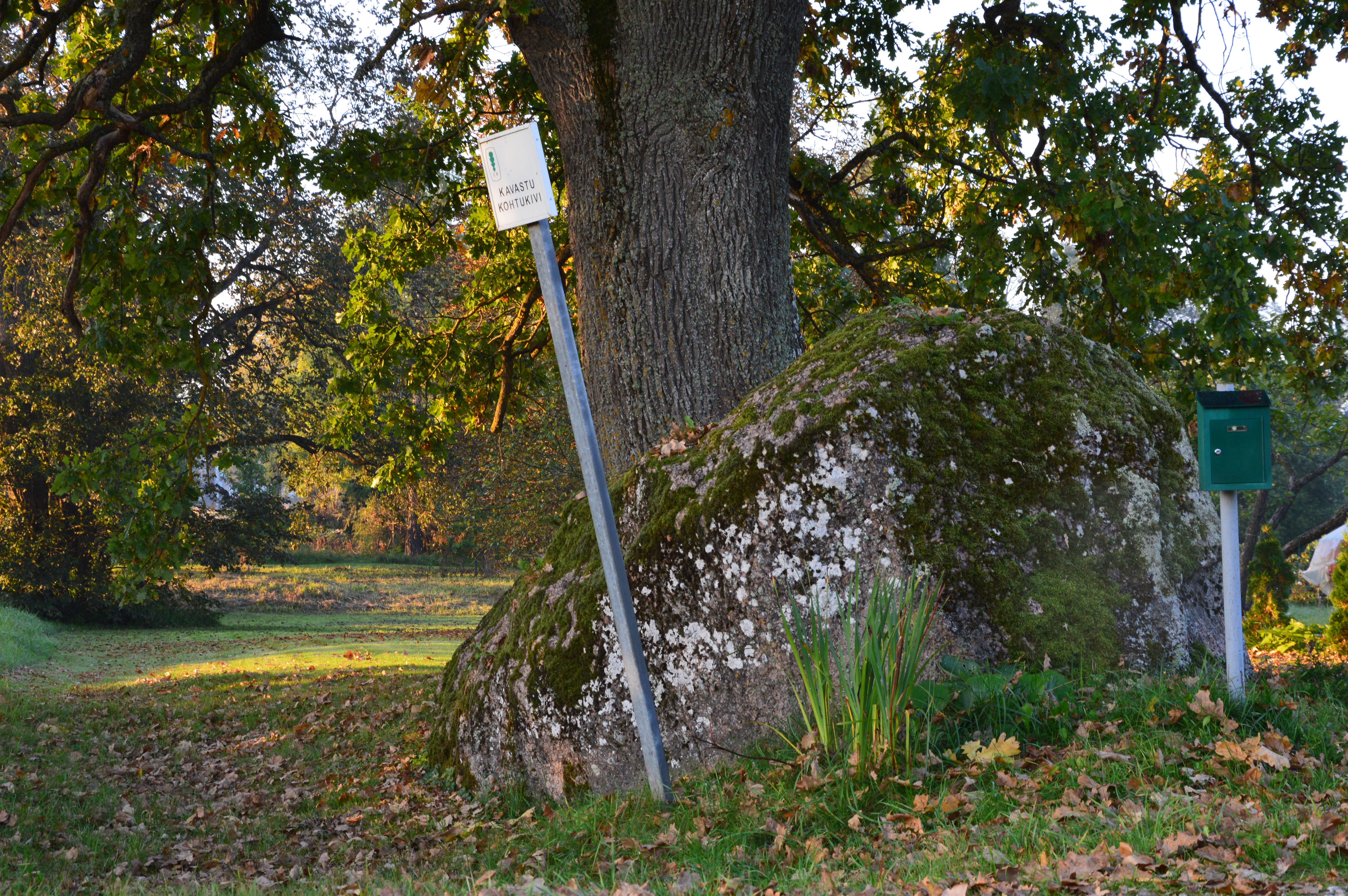 Kavastu kohtukivi